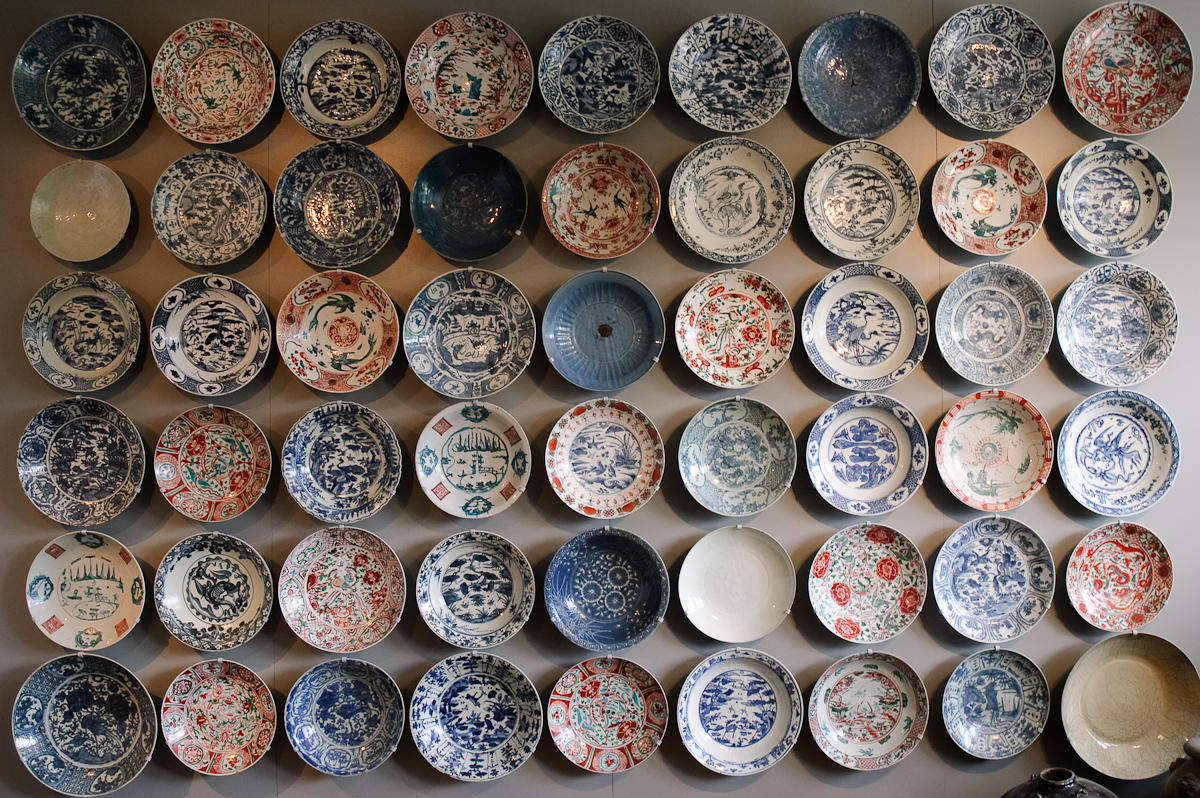 Zaal met Swatow-schalen en Martavanen één van de twee wanden met borden van Chinees porselein in Keramiekmuseum Princessehof